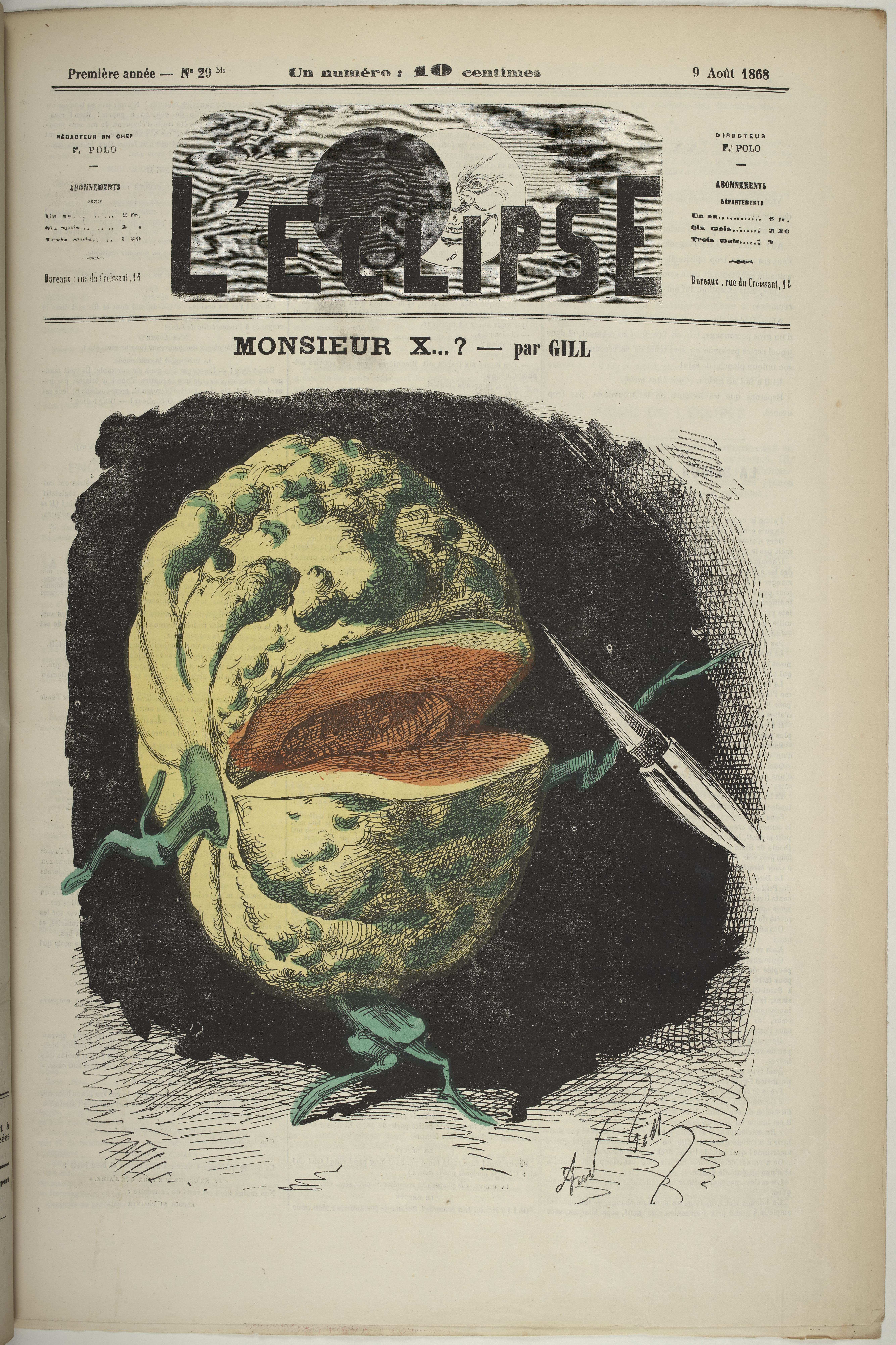 Monsieur X as a pumpkin by André Gill